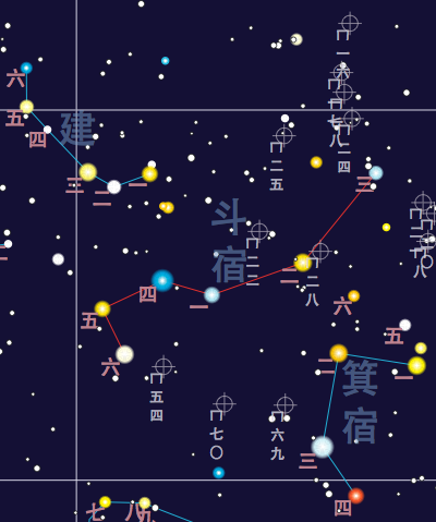 斗宿 (pinyin: Dǒu Xiù) / Dipper (Chinese constellation)